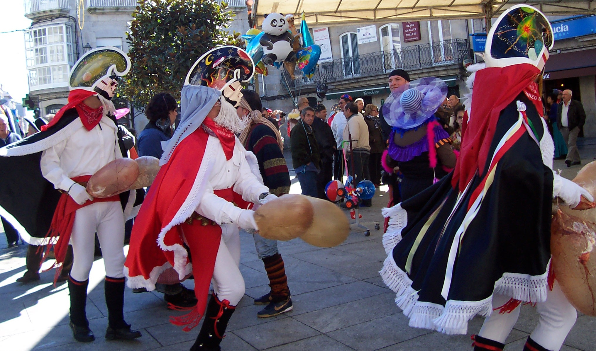 Antroido